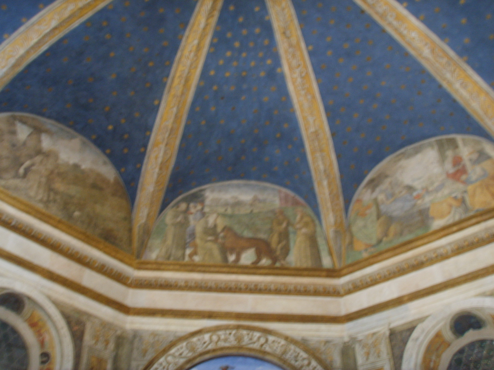 Santa Maria del Popolo, Pinturicchio frescos in chapels in Rome, Italy